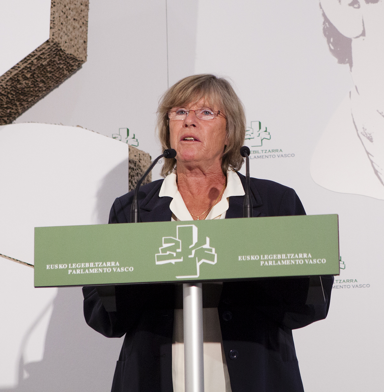 El lehendakari Urkullu asiste al homenaje al senador socialista Enrique Casas, asesinado por los Comandos Autónomos Anticapitalistas